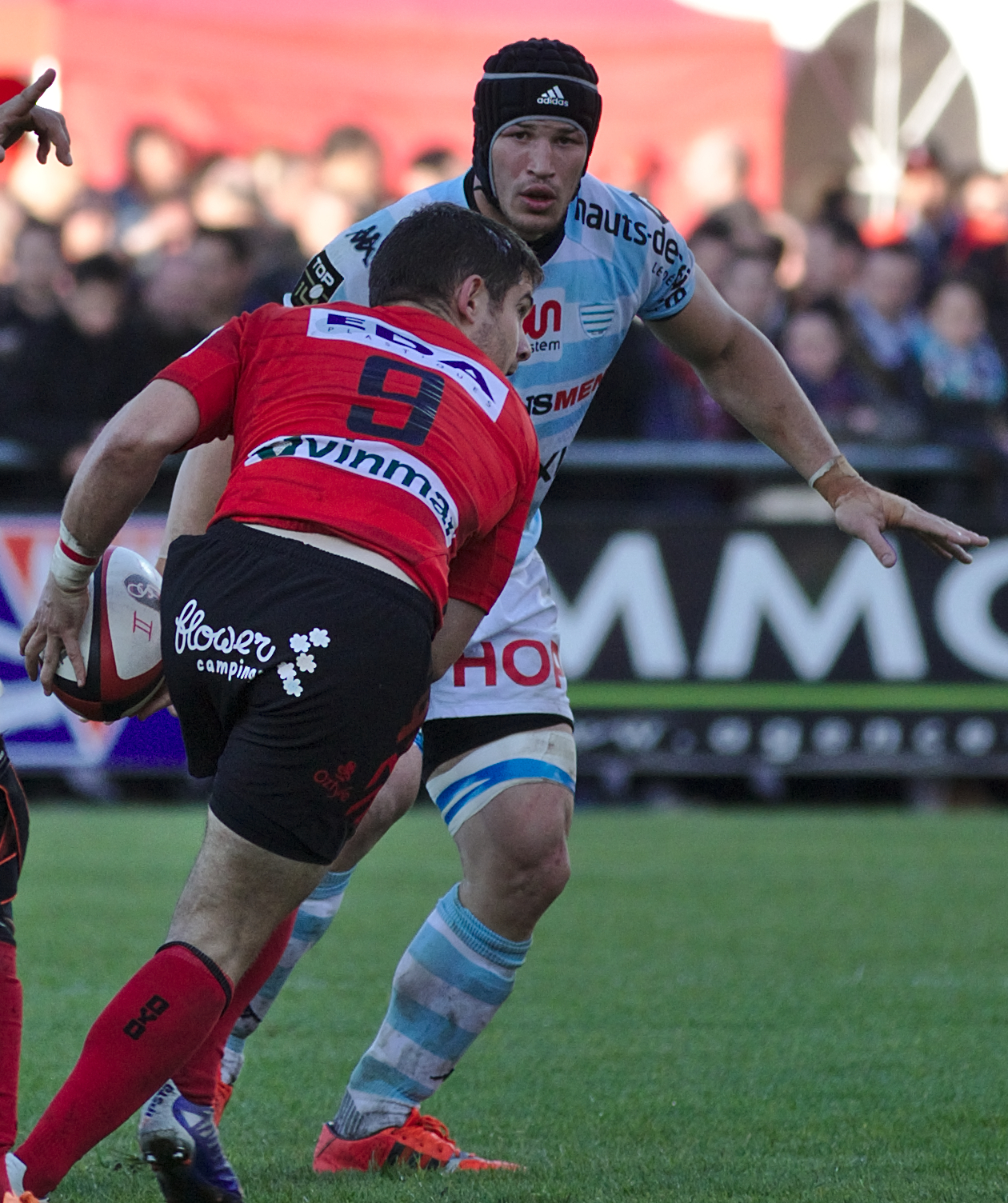 Match de rugby du Top 14 US Oyonnax-Racing Métro 92 du 25 avril 2015. Wenceslas Lauret (Racing Métro 92, de face) et Fabien Cibray (Oyonnax, numéro 9).